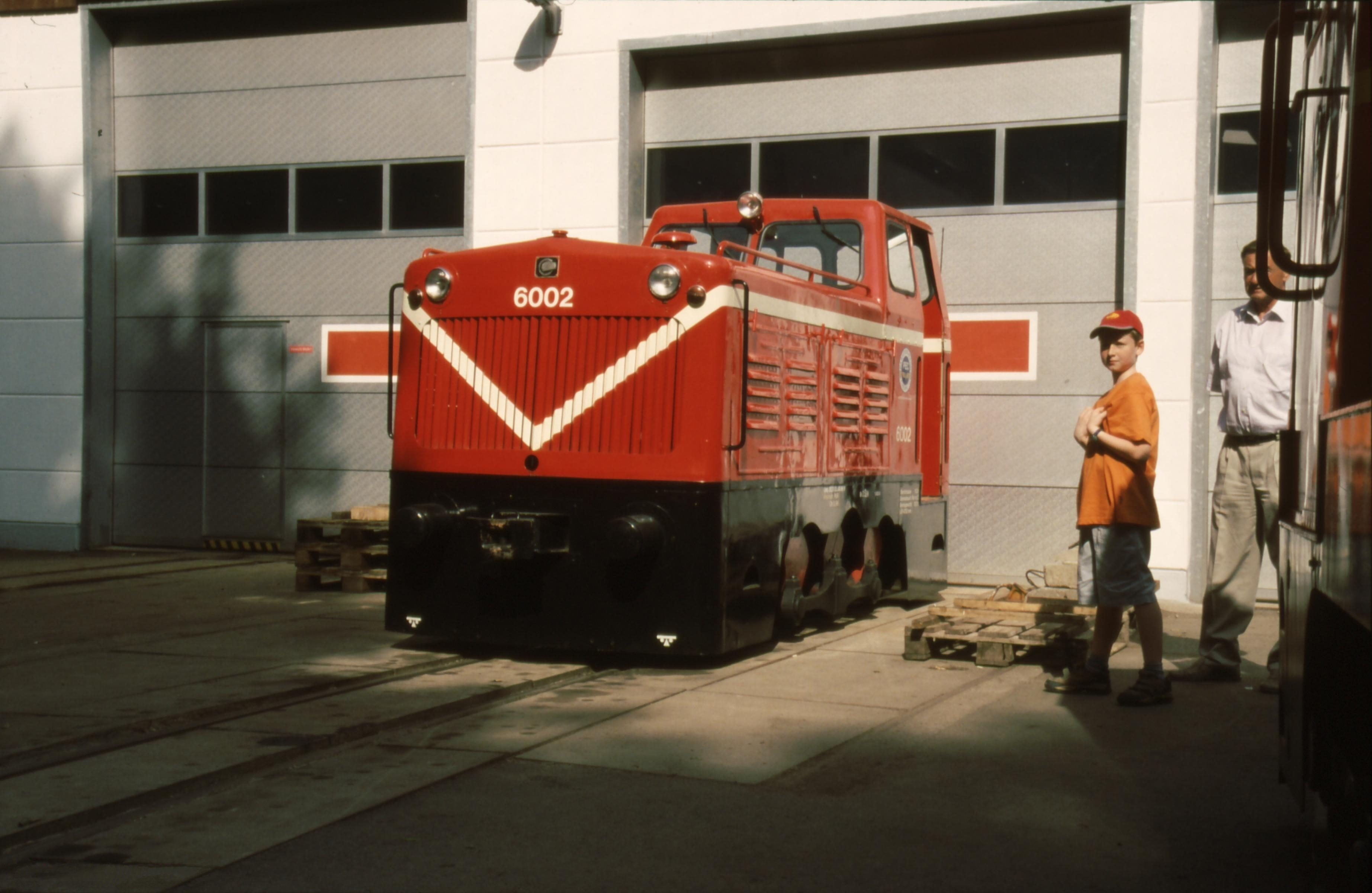 Die Lok 6002 steht vor dem neuen Lokschuppen